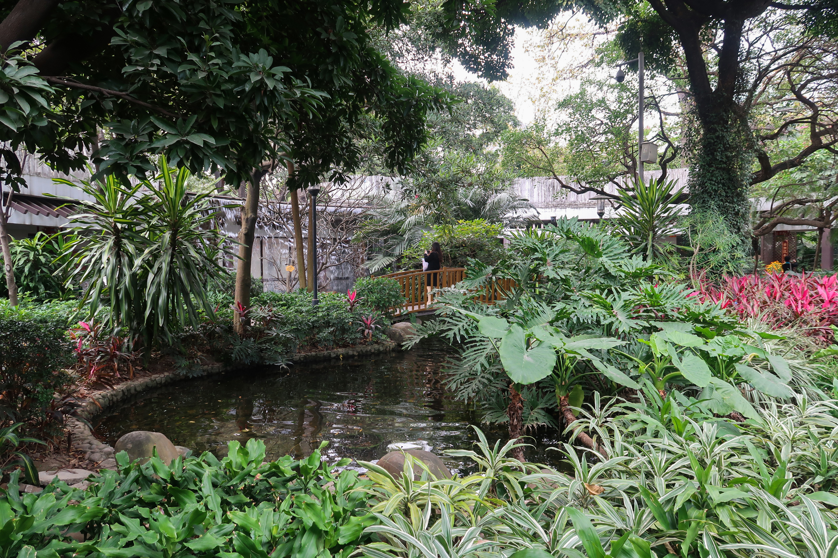 Guangzhou Cultural Park 西关苑